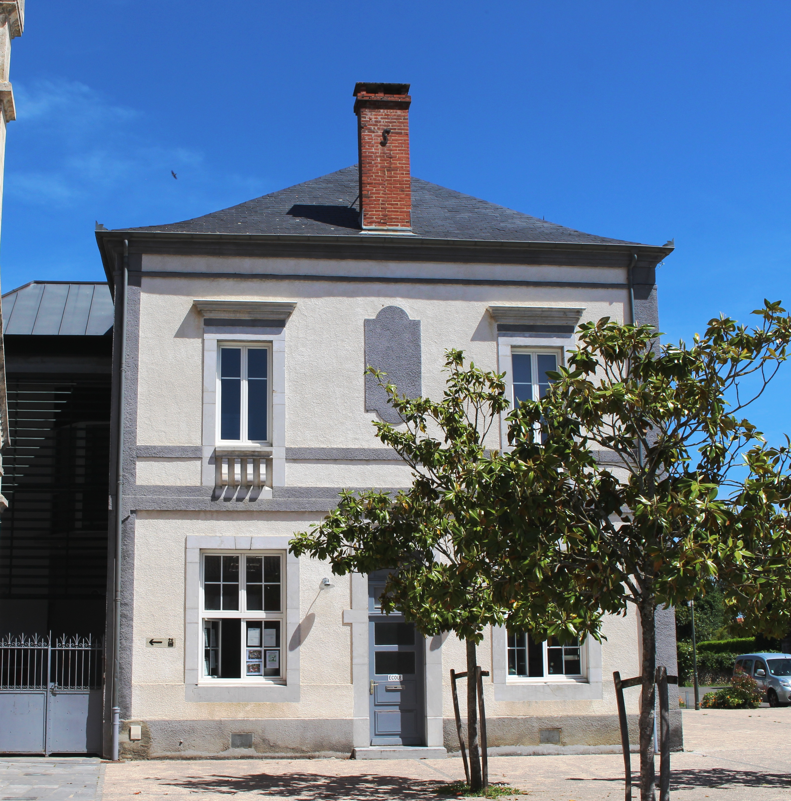 École de Pujo (Hautes-Pyrénées)